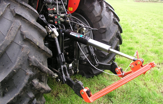 Hydraulisk toppstag